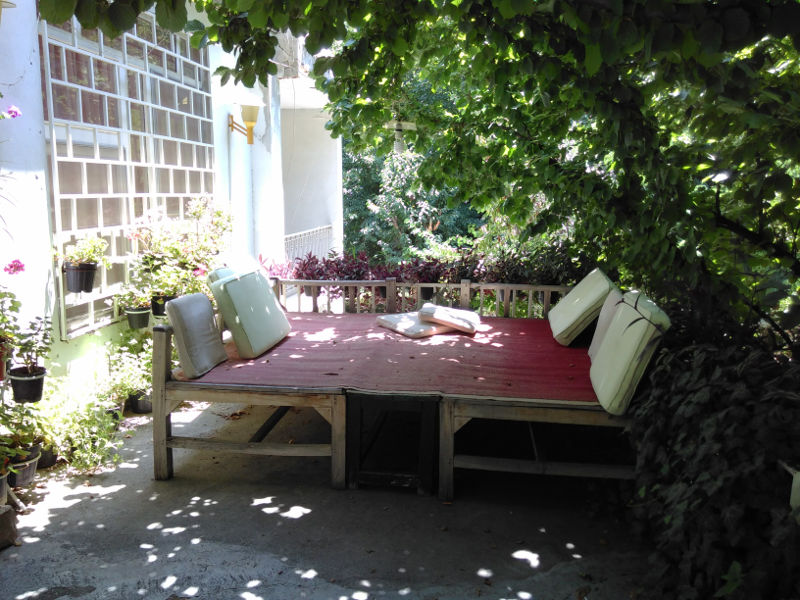 banc iranien (takht) à Mashad